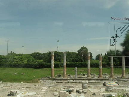 אקויילה המוזיאון הארכאולוגי הלאומי ב